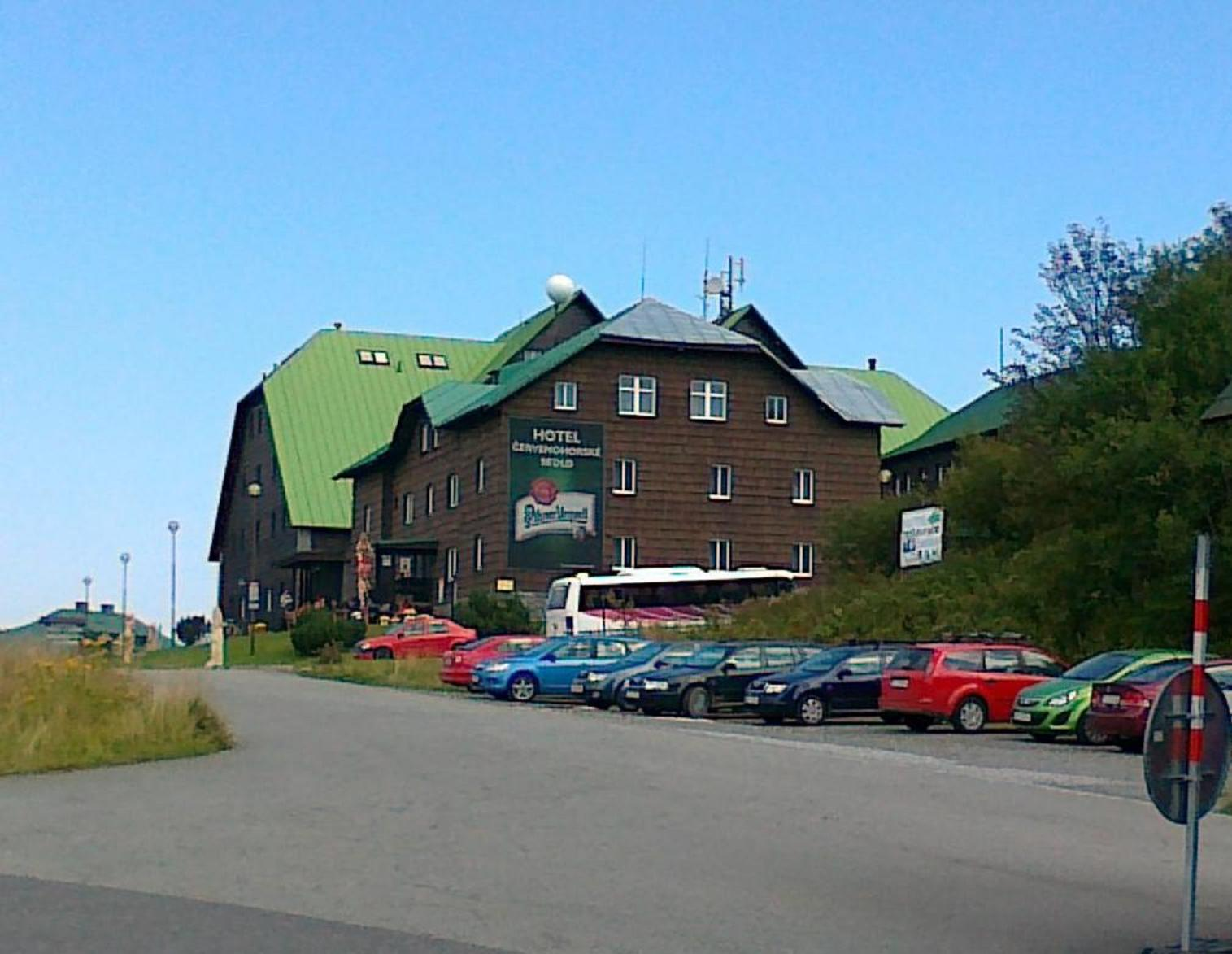 Widok na Hotel Červenohorské Sedlo